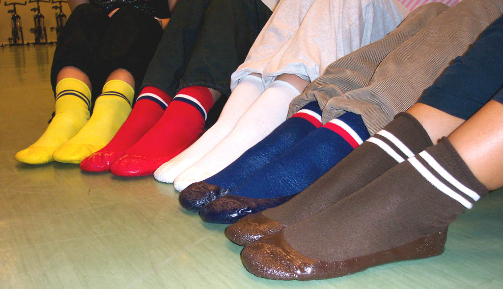 Bild på sockiplast från 70-talet.